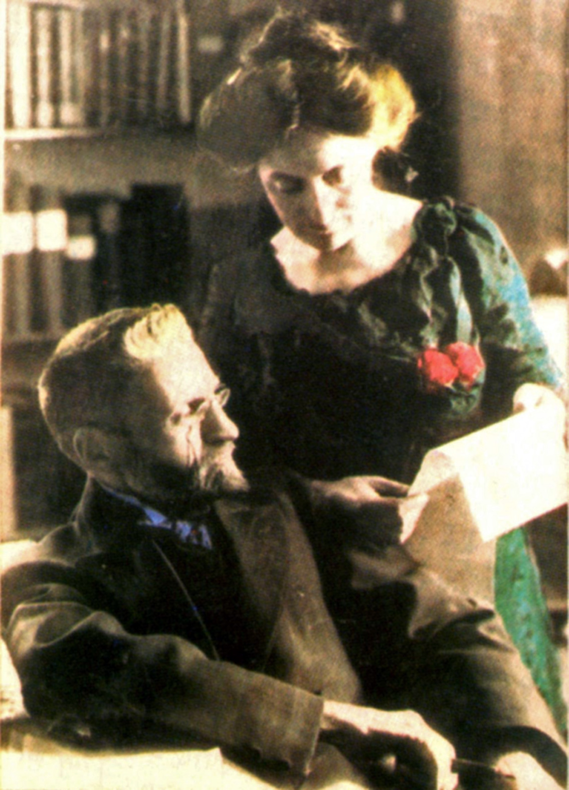 Eliezer Ben Jehuda